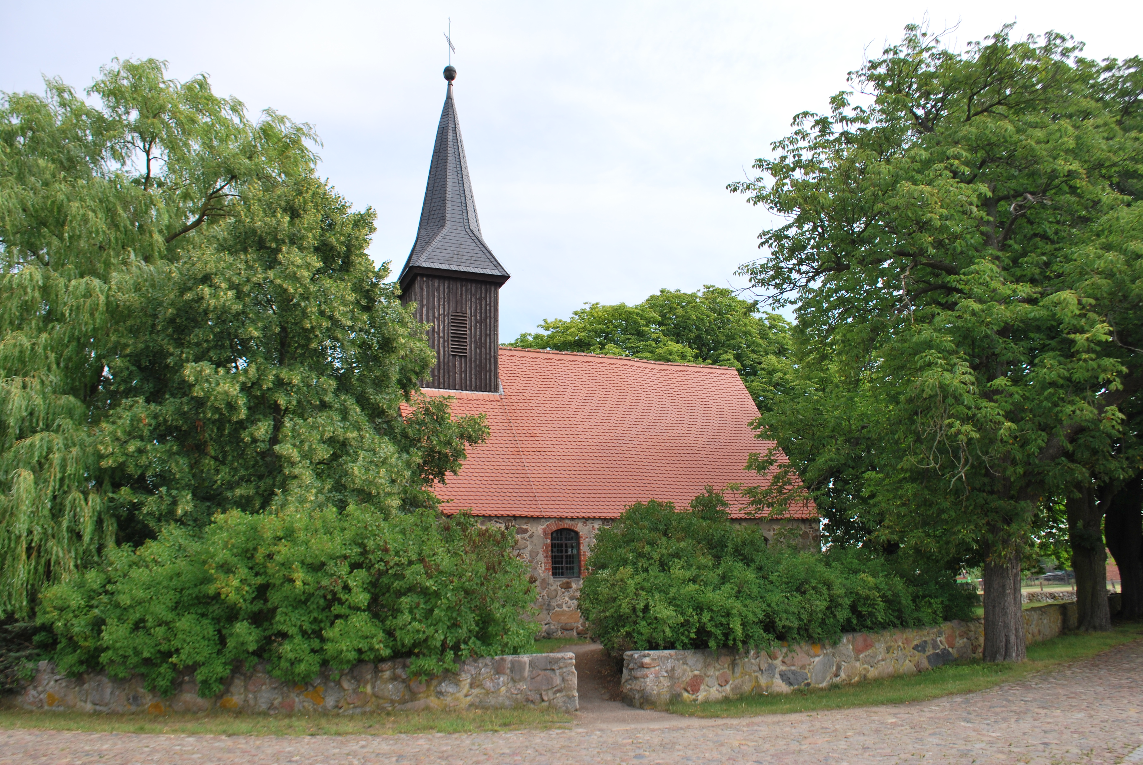 Dorfkirche Gieseritz